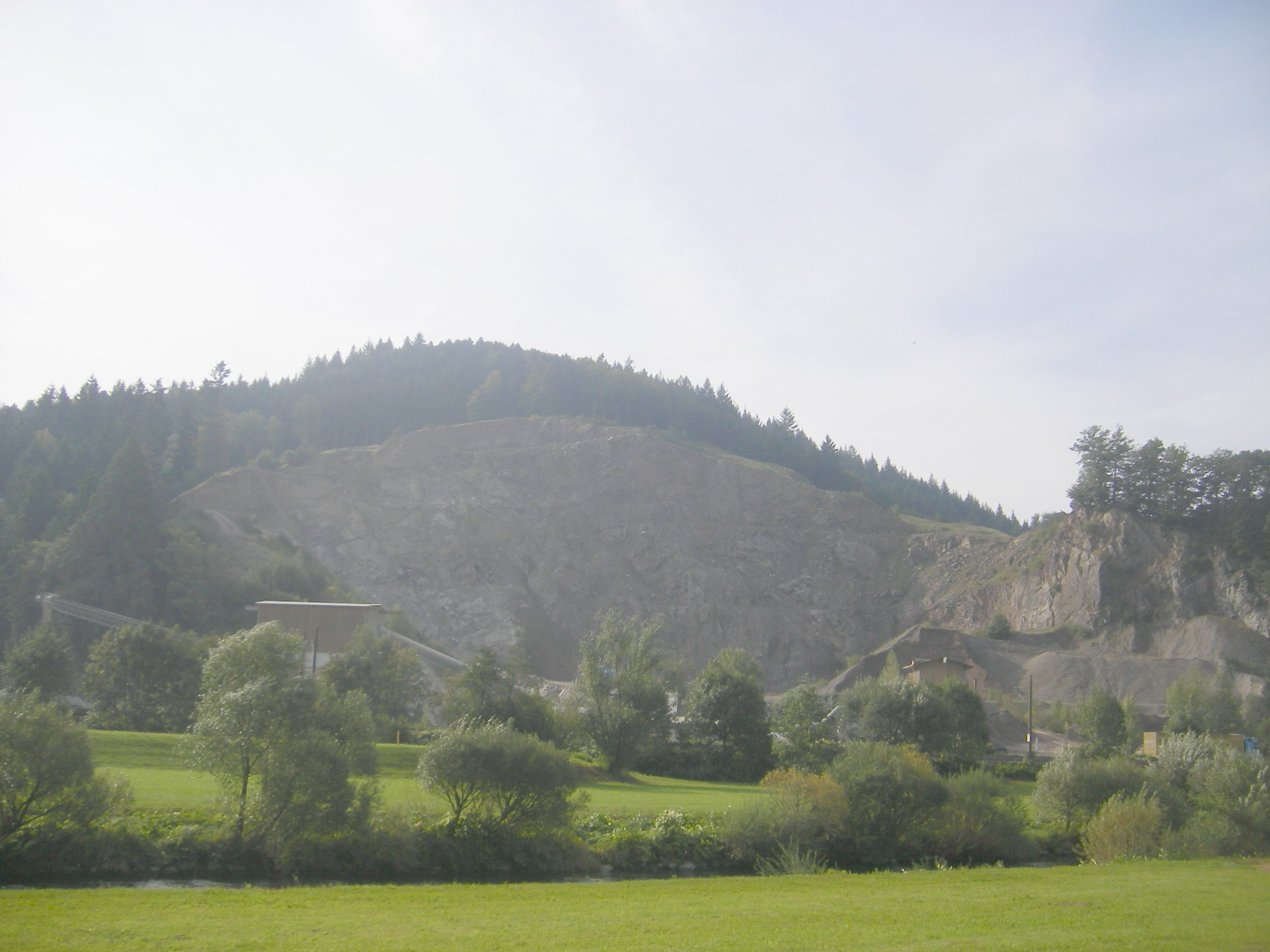 Quarry near Hechtsberg (Hausach)